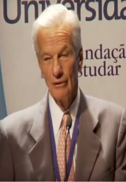 O empresário Jorge Paulo Lemann discursando em um evento da Fundação Estudar.